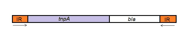 Transposoon Tn5